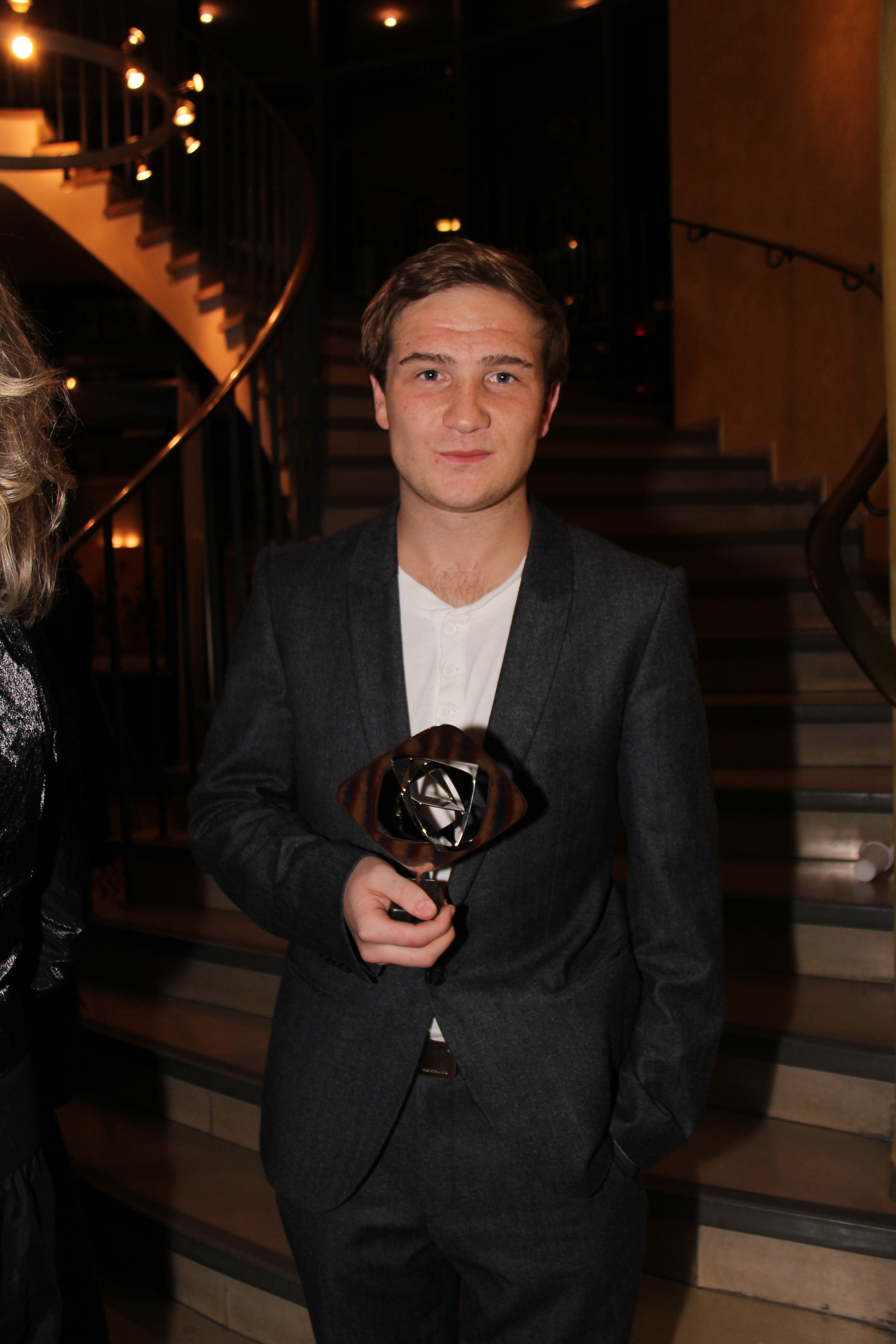 Grimme-Preisträger Frederick Lau bei der Verleihung 2011